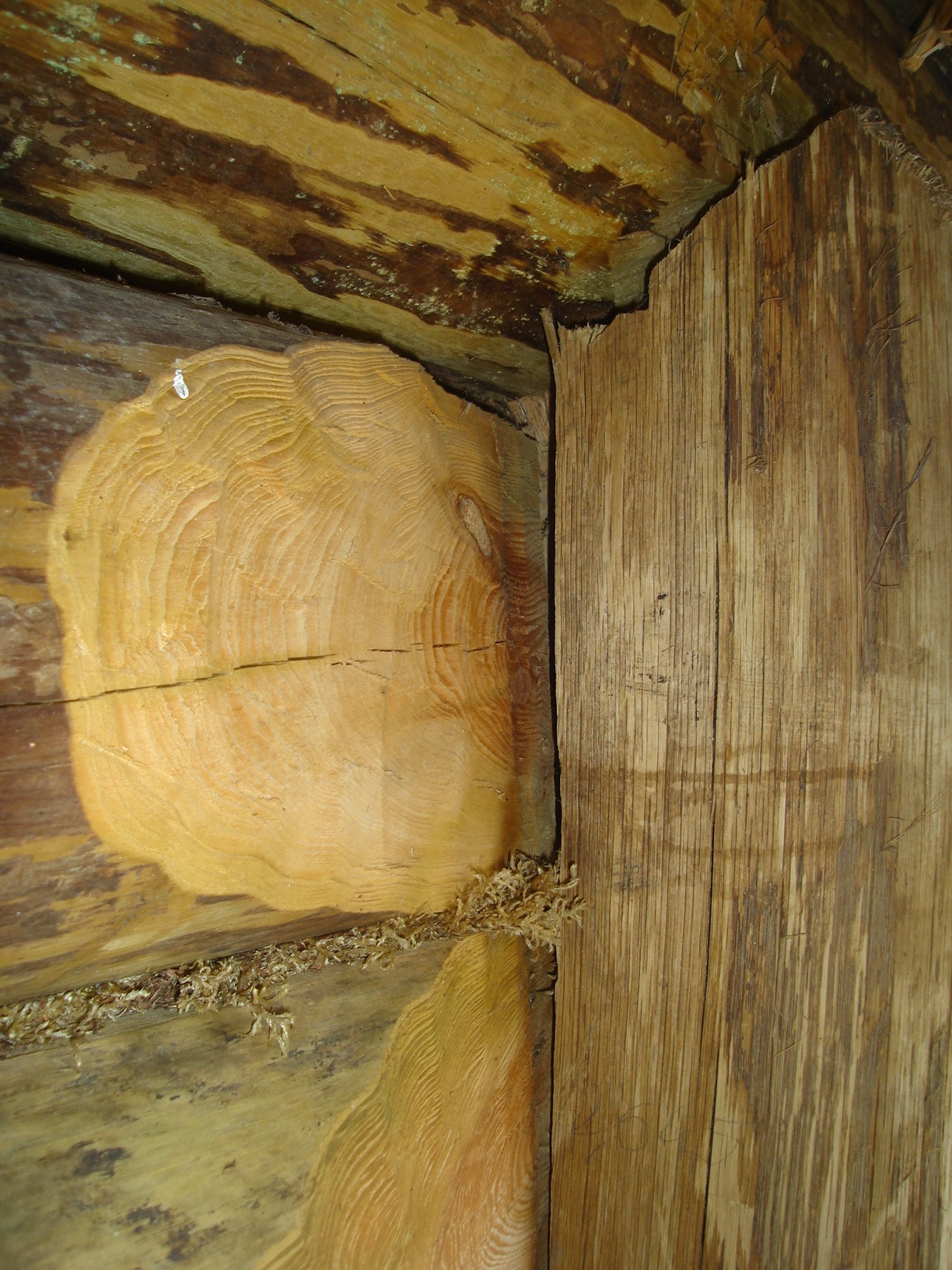 Konstrukcja sumikowo-łątkowa w Biskupinie. Sort of construction of buildings in lusatian cottages.